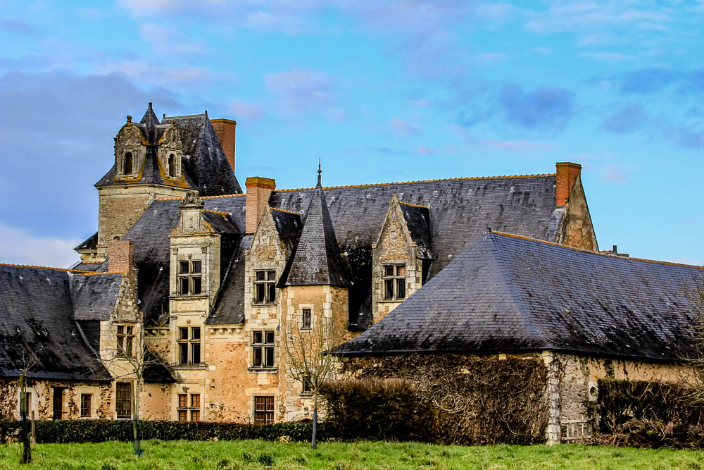 Manoir de la Hamonnière